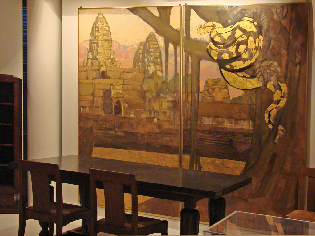 Mobilier (vers 1923) de J.E. Ruhlmann pour la maison de Boulogne du sculpteur Joseph Bernard. Musée des Années 30 - Espace Landowski